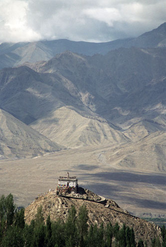 Paisatge amb el temple de Dharampala. Leh, Ladakh, Jammu i Caixmir, Índia